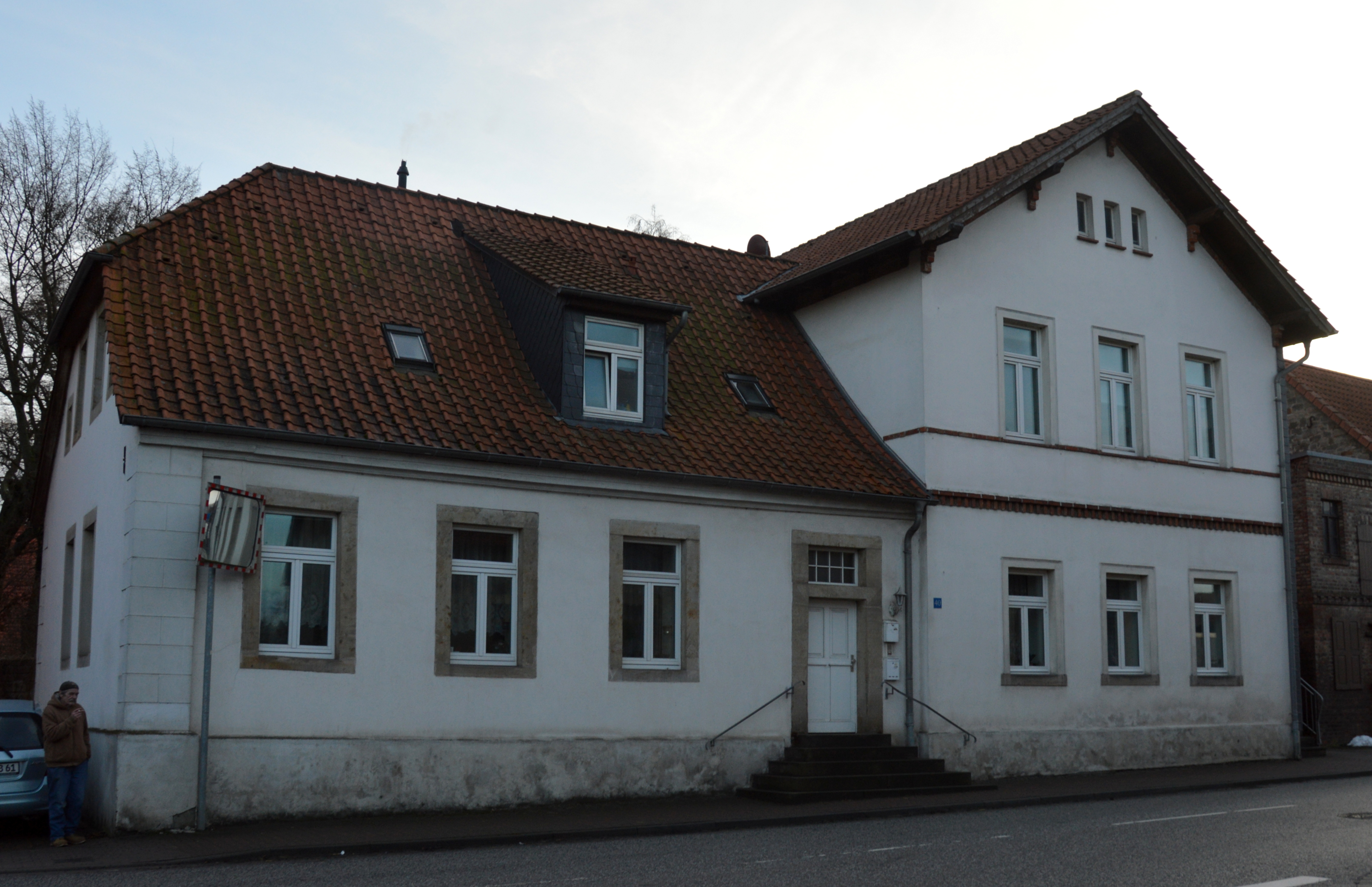 Haus Badelebener Straße 40 in Ummendorf